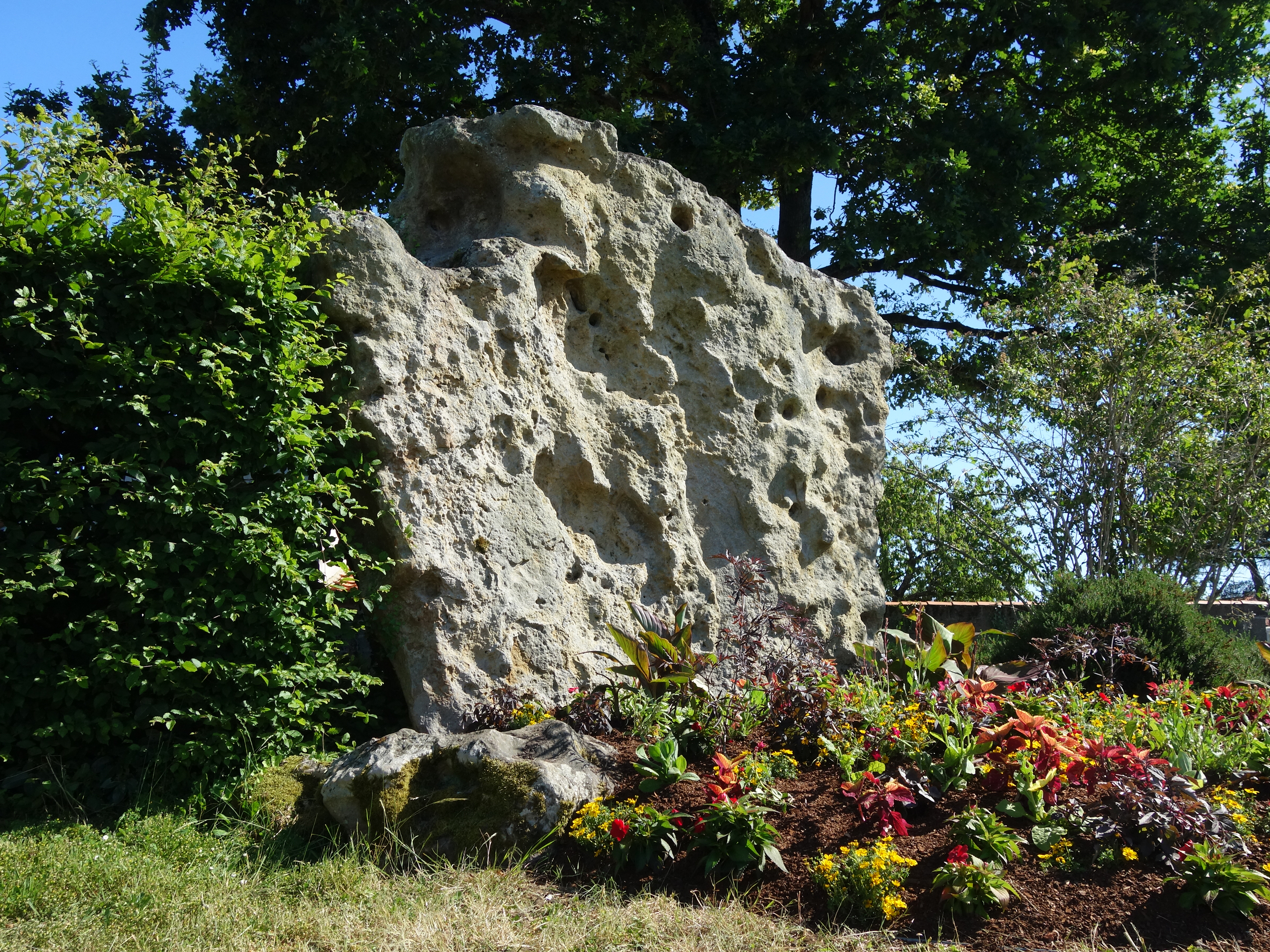 Ce grand menhir est fascinant ! Il mesure plus de 3 mètres de haut et 1 mètre de large en moyenne : sa surface est très irrégulière. Il s'agit d'un beau bloc de granite blanc de bonne taille, parsemé de cavités naturelles polies (très rares pour ce type de pierre). Il est l'un des rares menhirs encore en place aux alentours de Nantes.